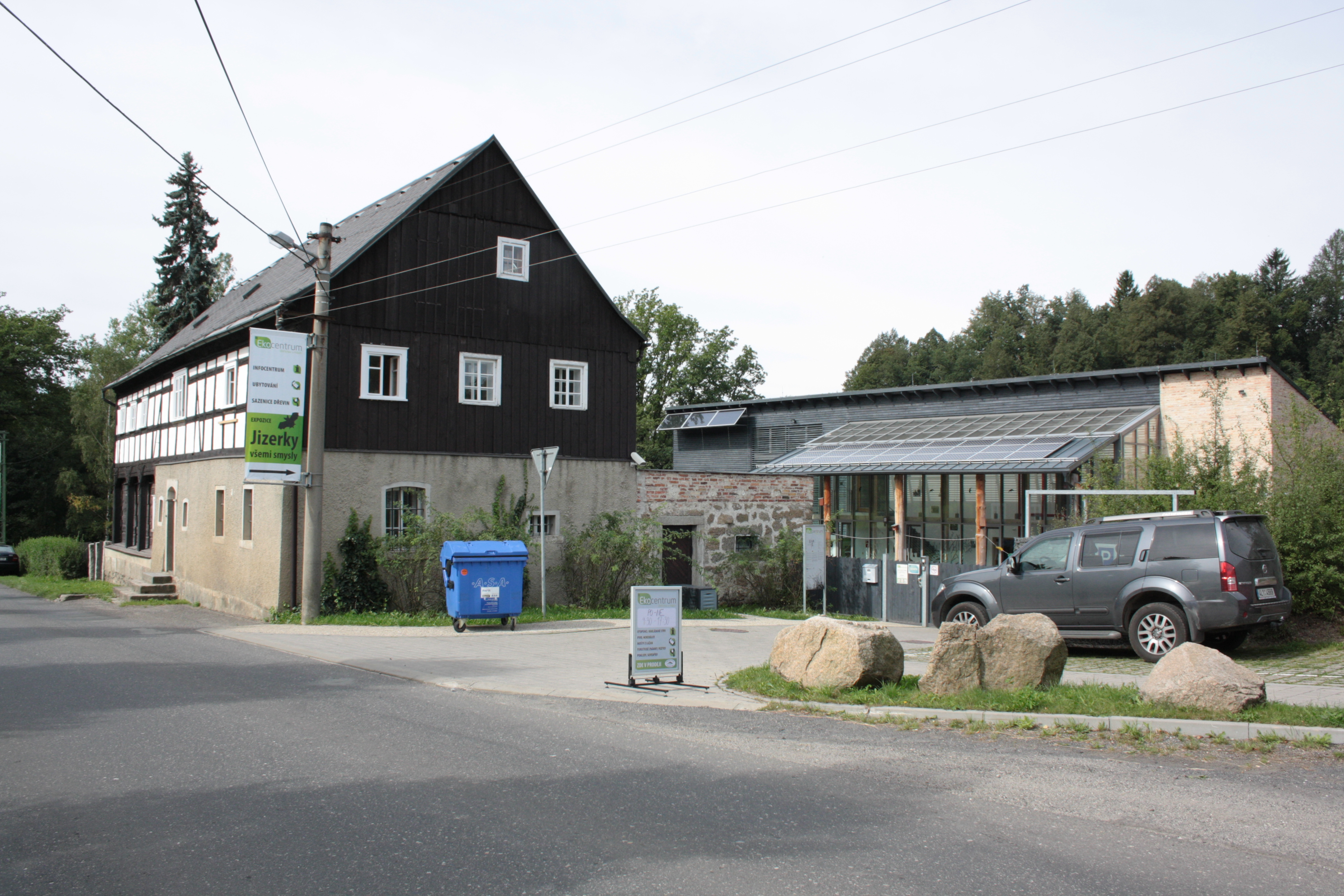 This photograph was taken with a DSLR from WMCZ's Camera grant. Bývalý zájezdní hostinec, dnes Ekocentrum Střevlík v Oldřichově v Hájích (pohled od severovýchodu).